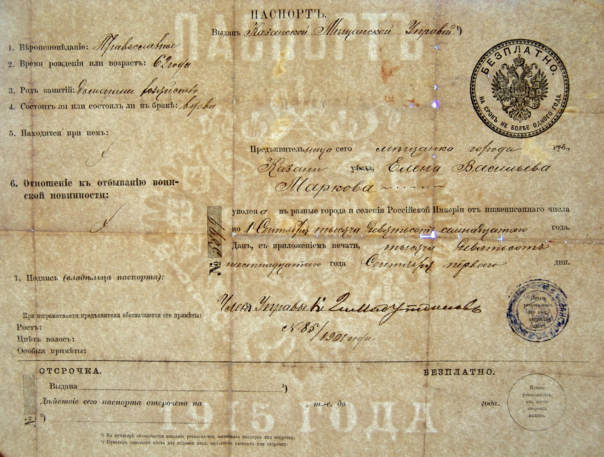 Временный паспорт, дающий право проезда и нахождения вне места постоянного проживания.